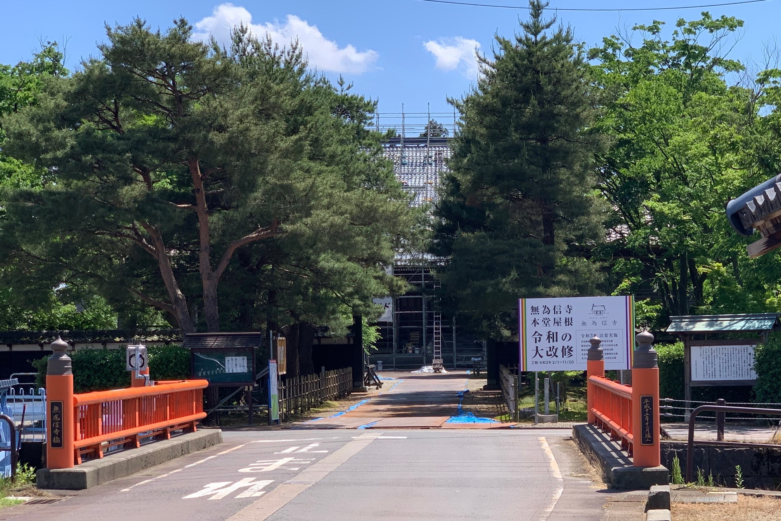 改修中の無為信寺と無為信寺橋（阿賀野市，2020年5月）